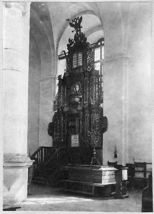 Беларуская (тарашкевіца): Друя (Druja). Сынагога